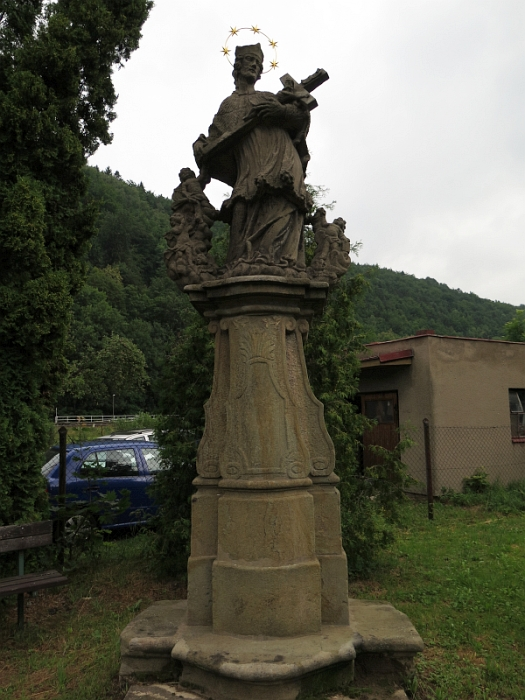 Socha svatého Jana Nepomuckého, při silnici k Ústí nad Orlicí, Černovír (Ústí nad Orlicí).